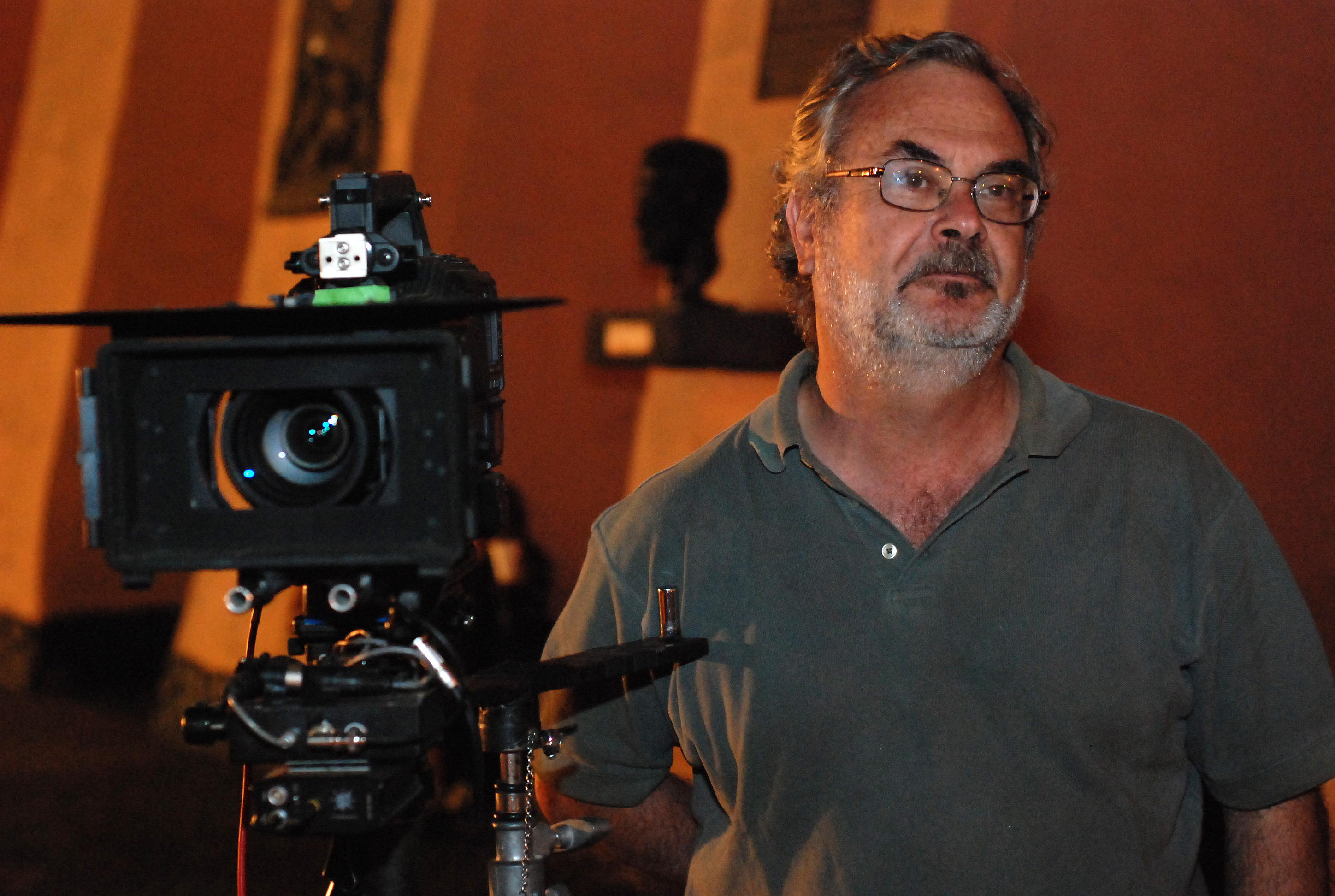 El director de cine peruano Augusto Tamayo en 2009.